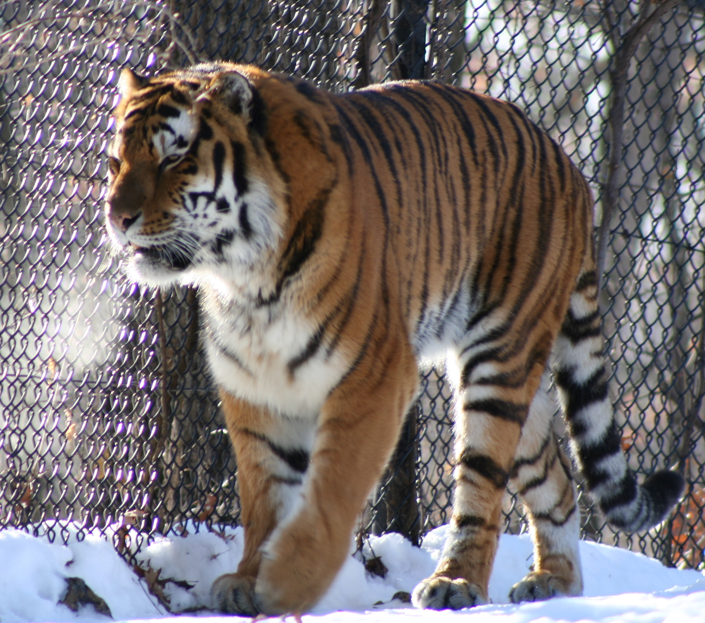 Minnesota Zoo